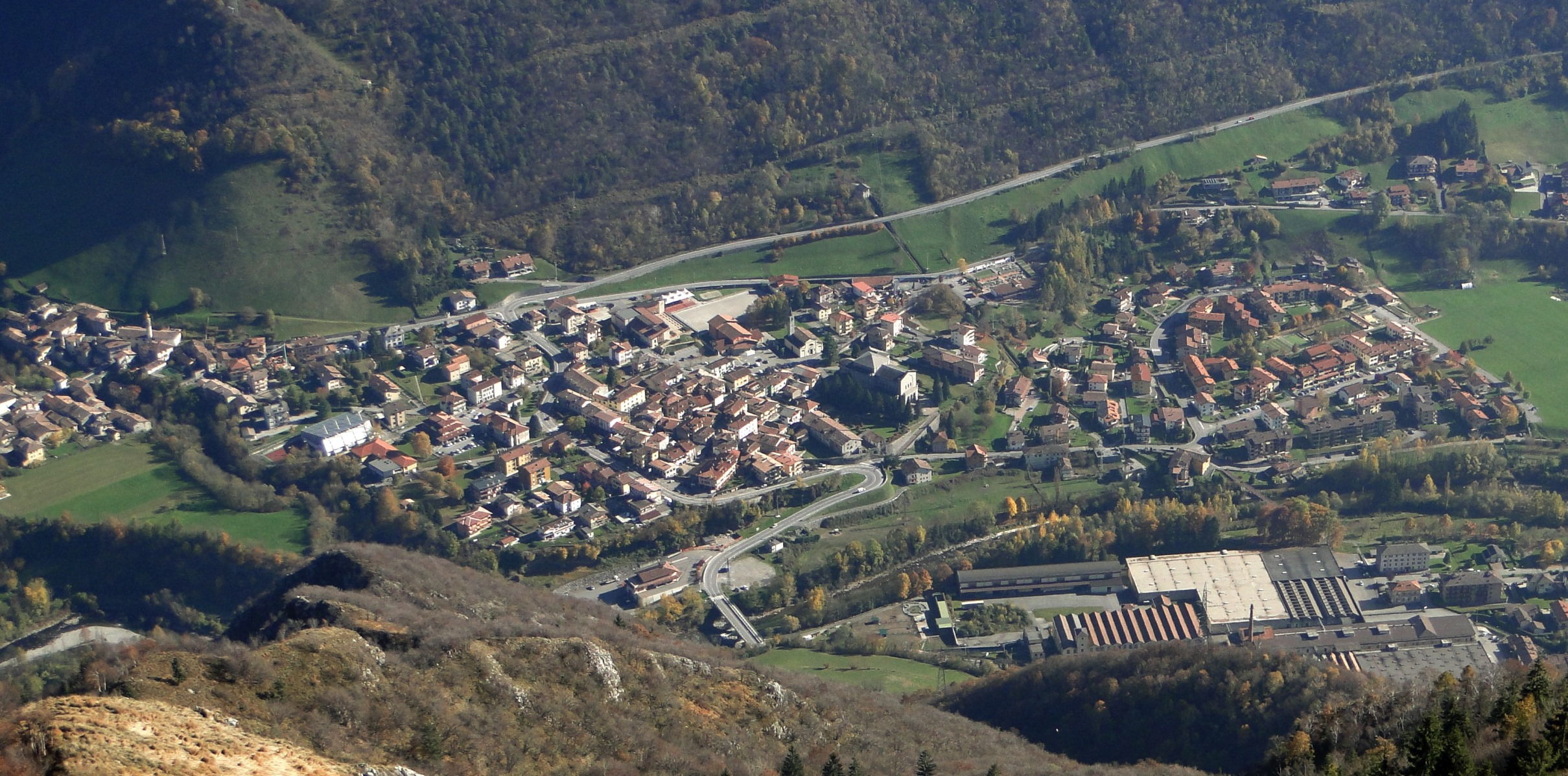 Panorama di Villa d'Ogna. Valle Seriana (BG)